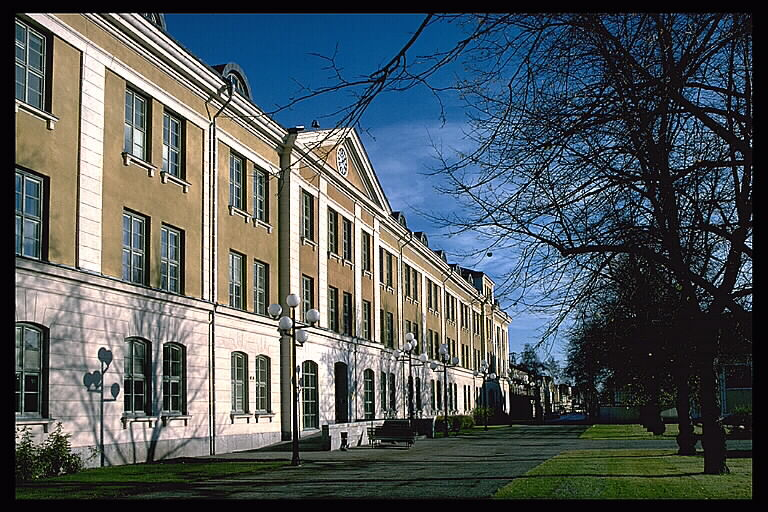 Före detta kasern tillhörande K4. Bilden troligen från slutet av 1970-talet.; Byggnadsverk; Offentlig förvaltning; Stadshus